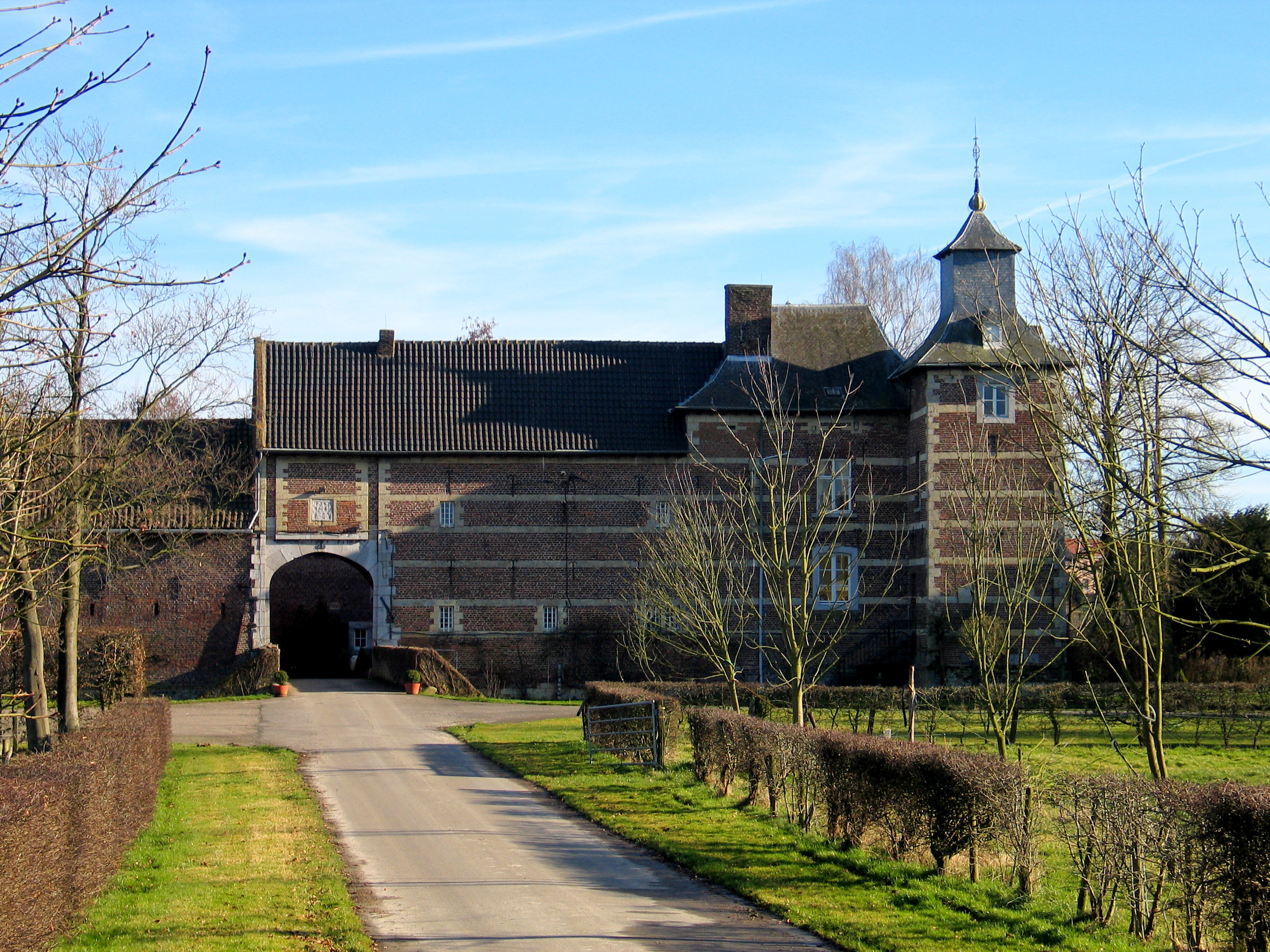 Kasteel te Widooie, Tongeren, België.